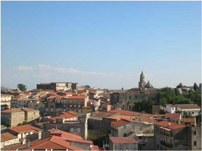 Panorama di Teano (provincia di Caserta)